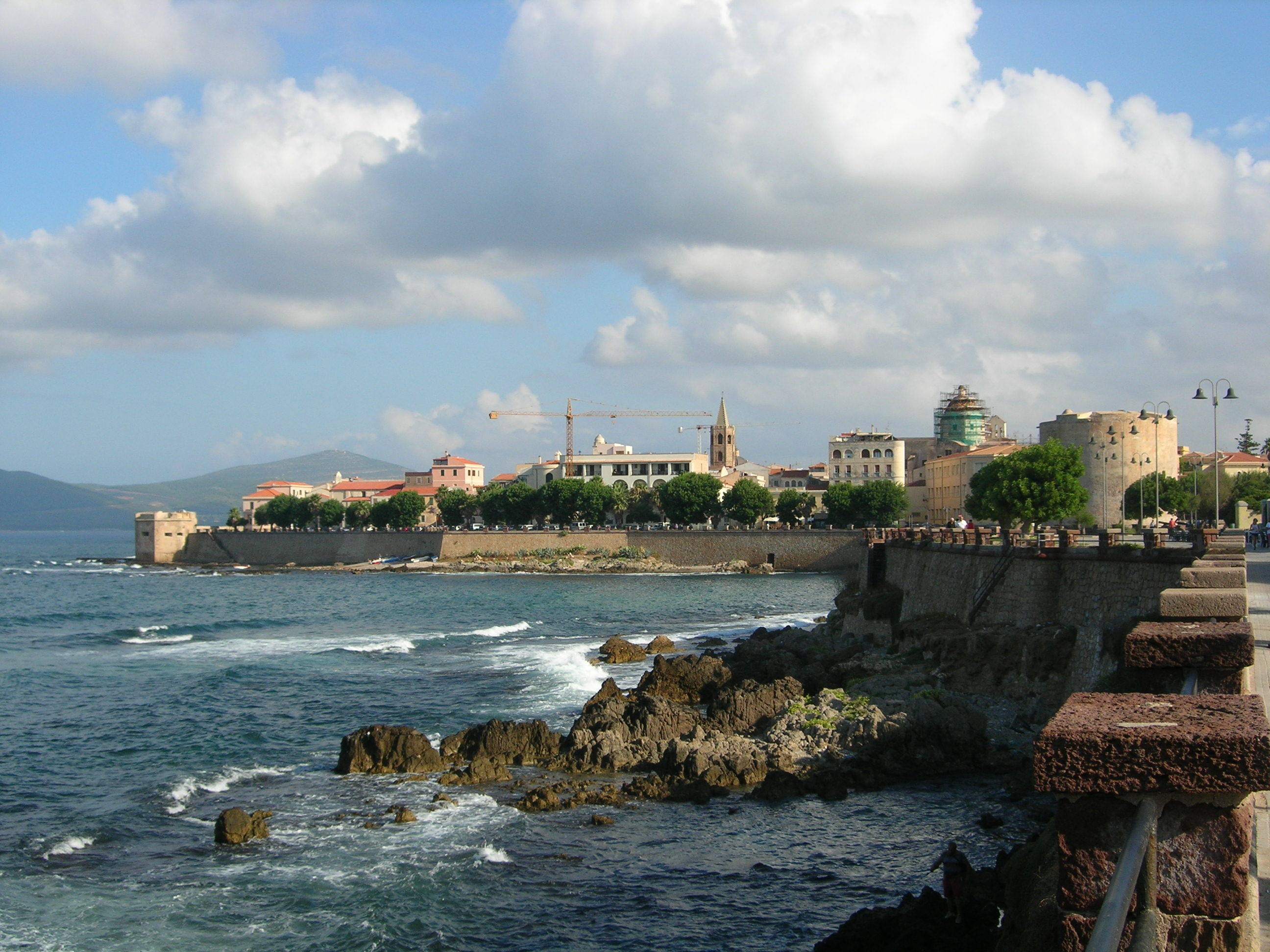 La Passejada, amb la ciutat emmurallada al fons (l'Alguer)